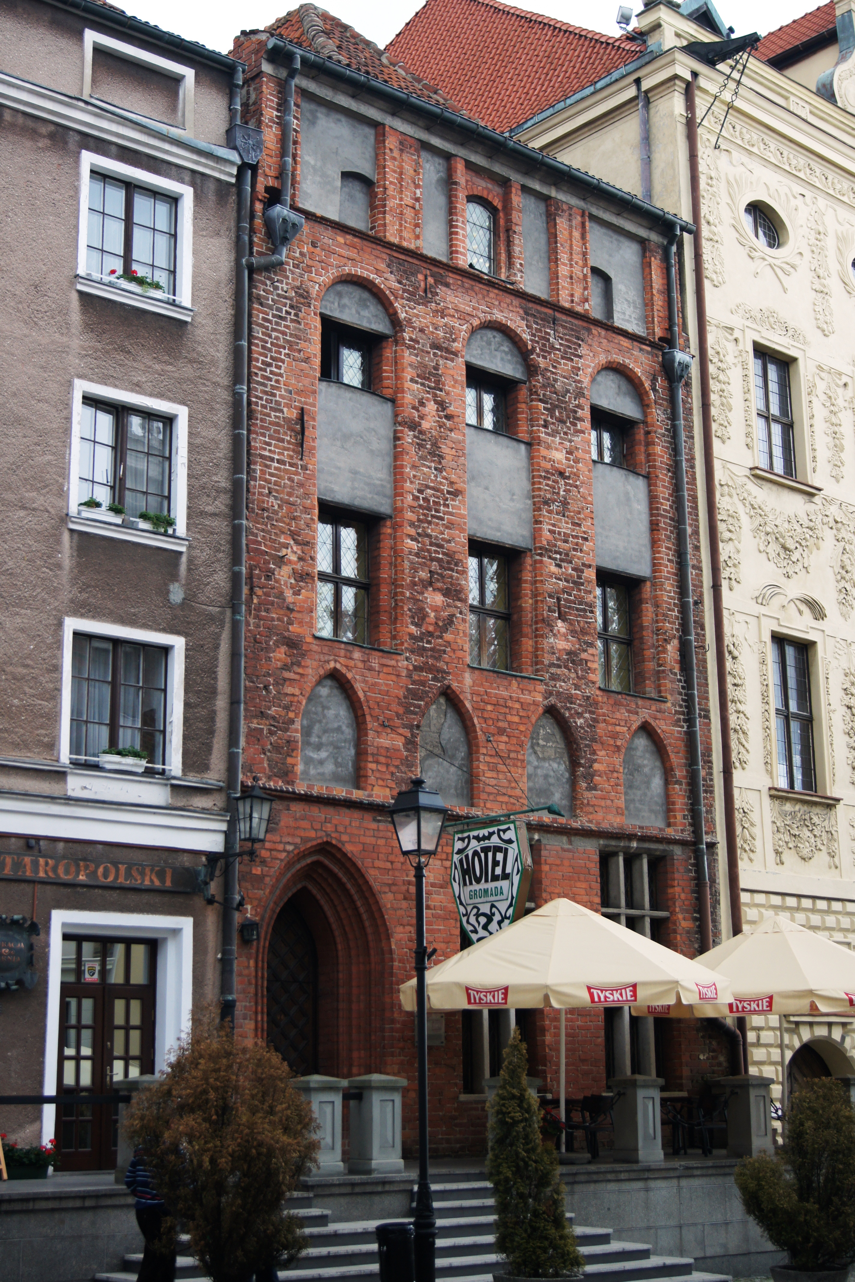 Toruń, ul. Żeglarska 10 - dom, 2 poł. XIV, XV, XIX (zabytek nr rejestr. A/138/236)